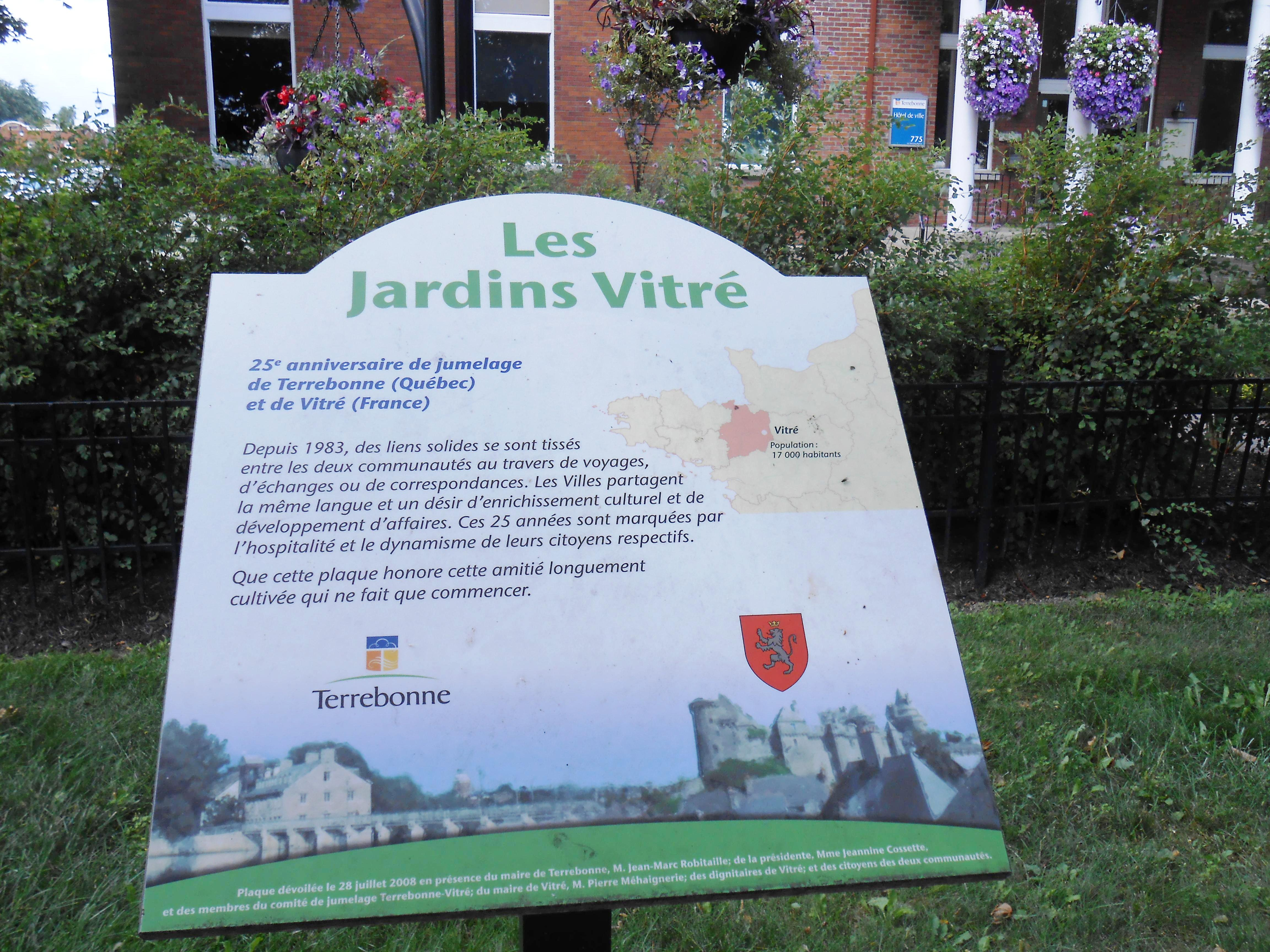 Plaque devant l'hôtel de ville de Terrebonne. Y est écrit ; « Les Jardins Vitré 25e anniversaire de jumelage de Terrebonne (Québec) et de Vitré (France) Depuis 1983, des liens solides se sont tissés entre les deux communautés au travers de voyages, d'échanges ou de correspondances. Les Villes partagent la même langue et un désir d'enrichissement culturel et de développement d'affaires. Ces 25 années sont marquées par l'hospitalité et le dynamisme de leurs citoyens respectifs. Que cette plaque honore cette amitié longuement cultivée qui ne fait que commencer. »